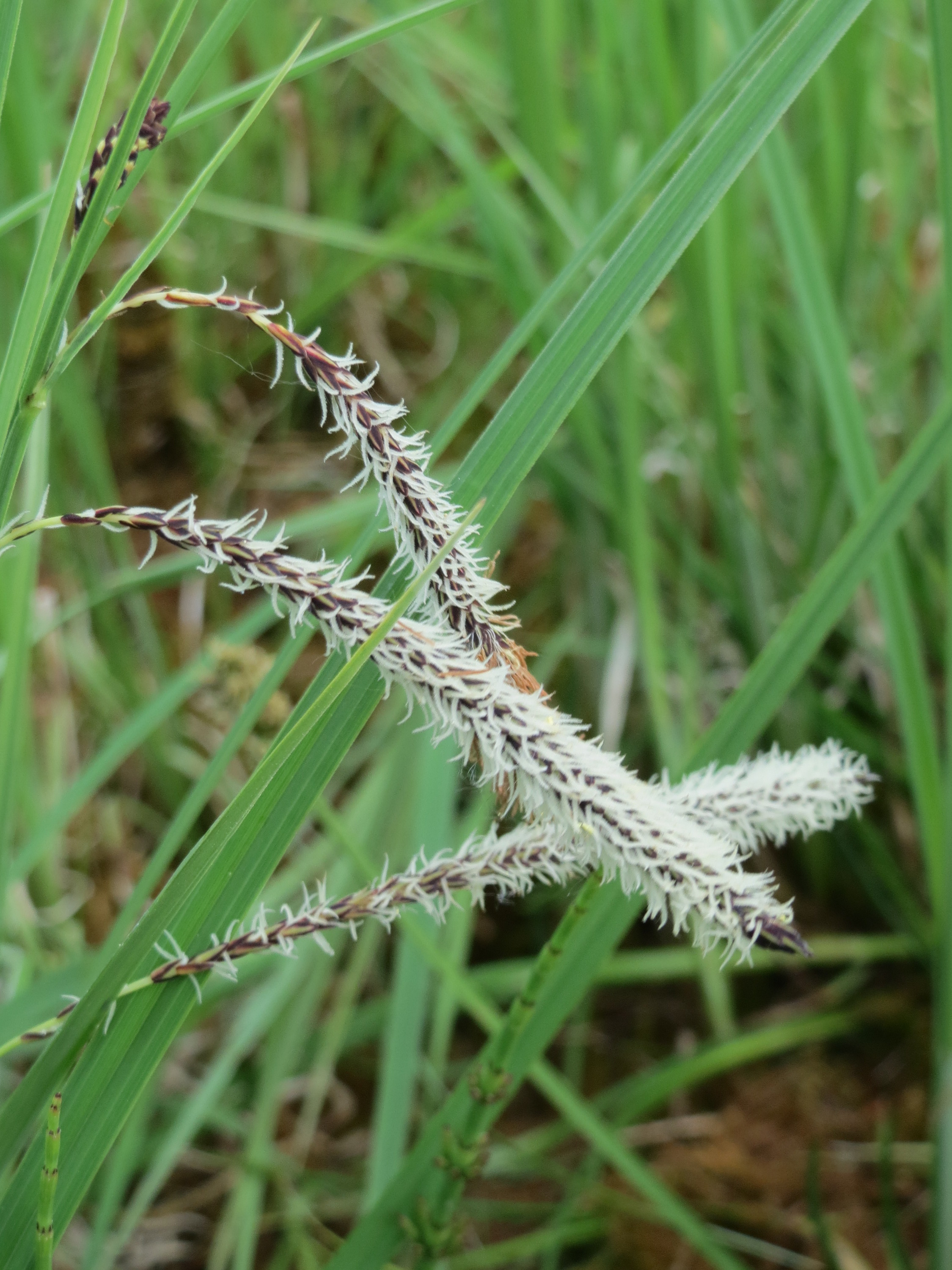 Schlank-Segge (Carex acuta) in den Horststückern (Hockenheimer Rheinbogen)